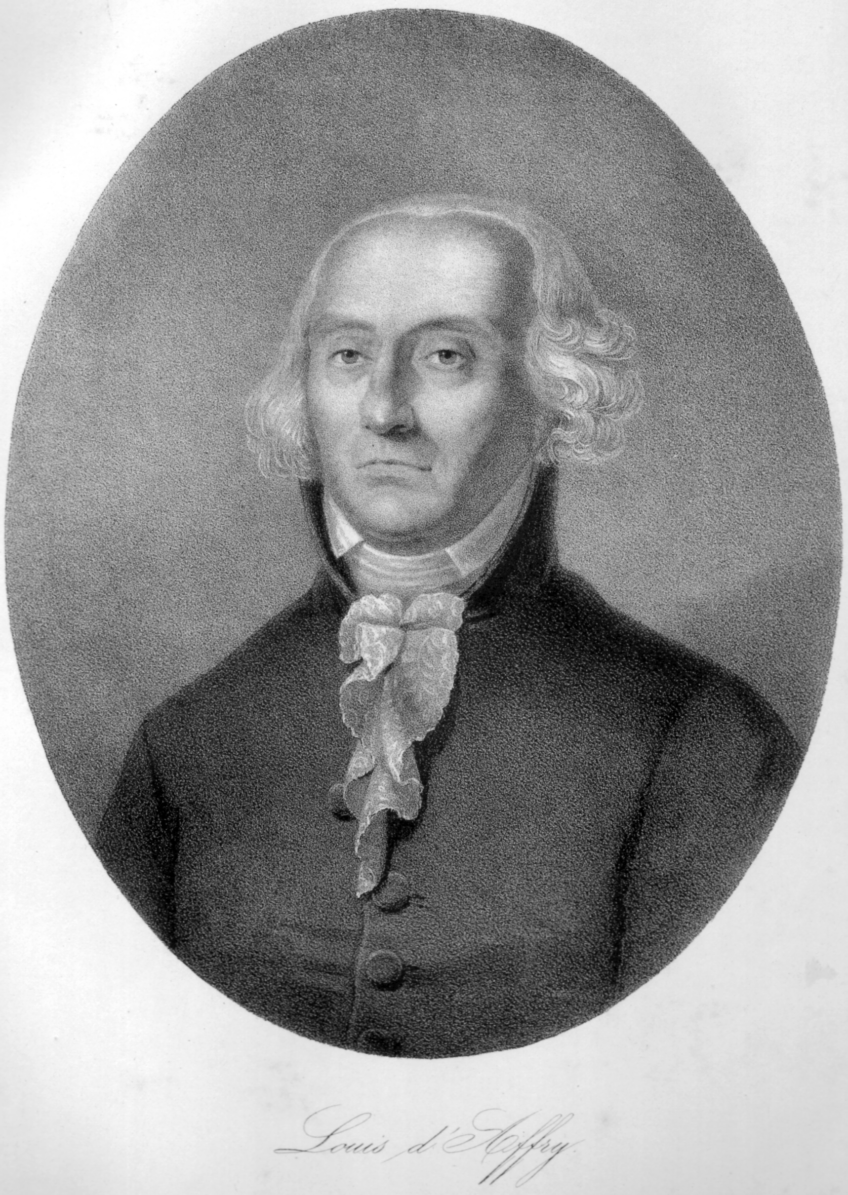 Louis d'Affry, Schweizer Politiker aus Fribourg, erster Landammann der Schweiz 1803